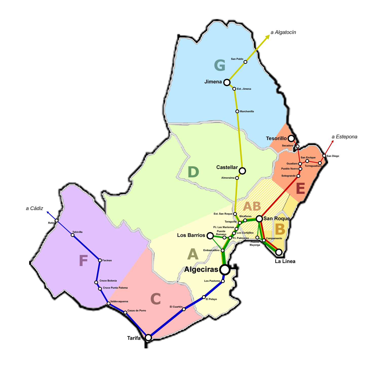 Mapa simplificado de los trayectos de las líneas de autobuses metropolitanos del Campo de Gibraltar. A mayor número de líneas, mayor grosor (3 píxeles de ancho = 1 línea). En verde los trayectos dentro de la Bahía de Algeciras. En rojo, las salidas hacia la Costa del Sol. En azul, los de la Costa de la Luz. Y en amarillo, los de la Serranía.